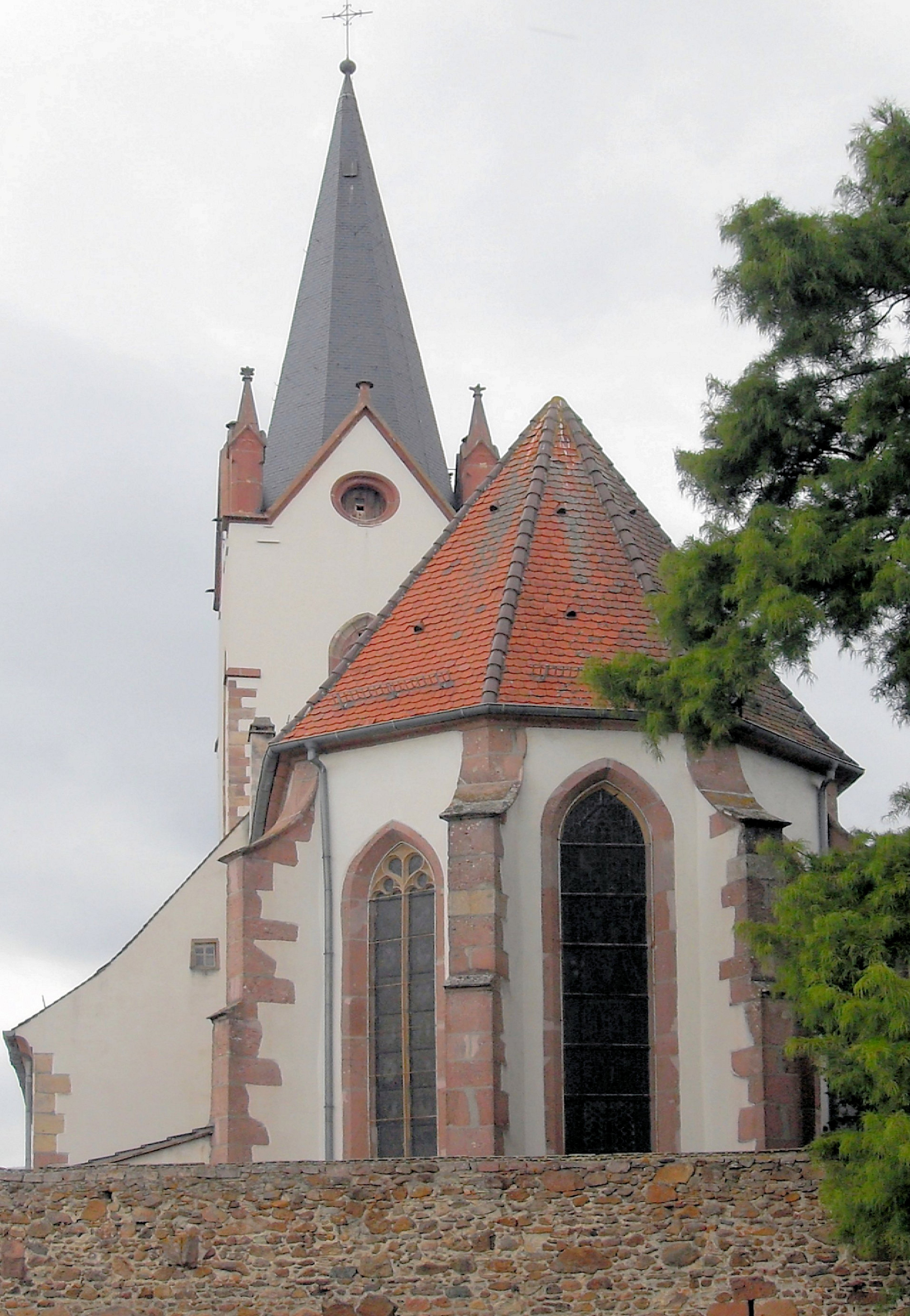 L'église Saint-Blaise à Hartmannswiller